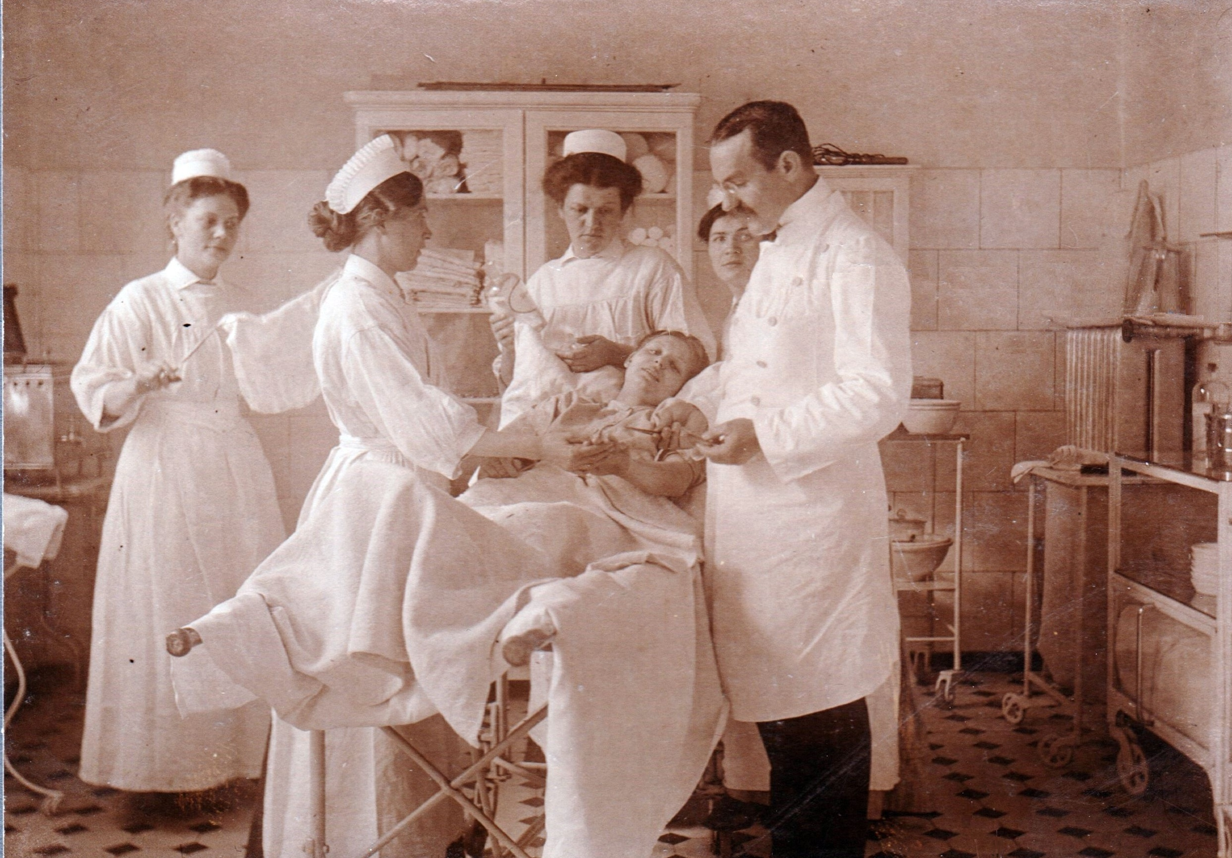 Heinrich Klose und Krankenschwestern bei der Versorgung einer Patientin in der Chirurgischen Klinik von Frankfurt am Main